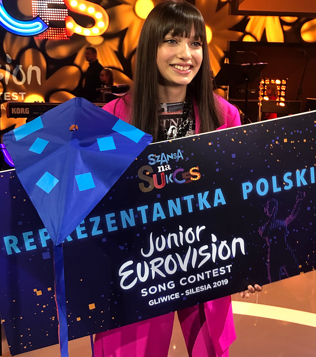 Polska piosenkarka Wiktoria Gabor po zwycięstwie w programie Szansa na sukces. Eurowizja Junior 2019.